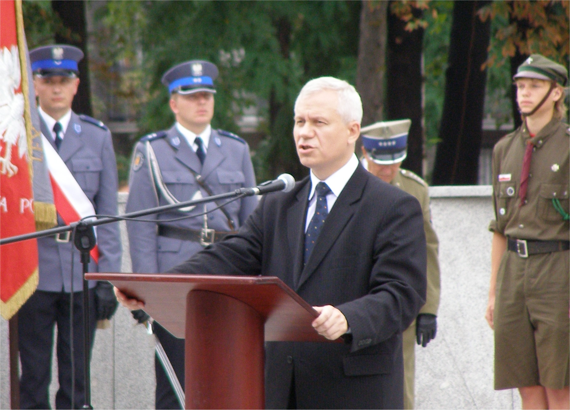 Marek Jurek 1.08.2006 (fot Zu)